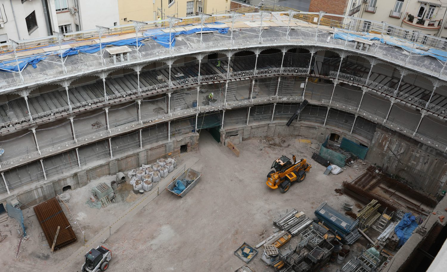 La primera fase de rehabilitación del frontón Beti Jai, realizada con el objetivo de respetar al máximo la estructura y elementos originales del edificio y garantizar su seguridad y estabilidad, ha concluido. Este lunes se han presentado los resultados de ese trabajo en un recorrido por el espacio.